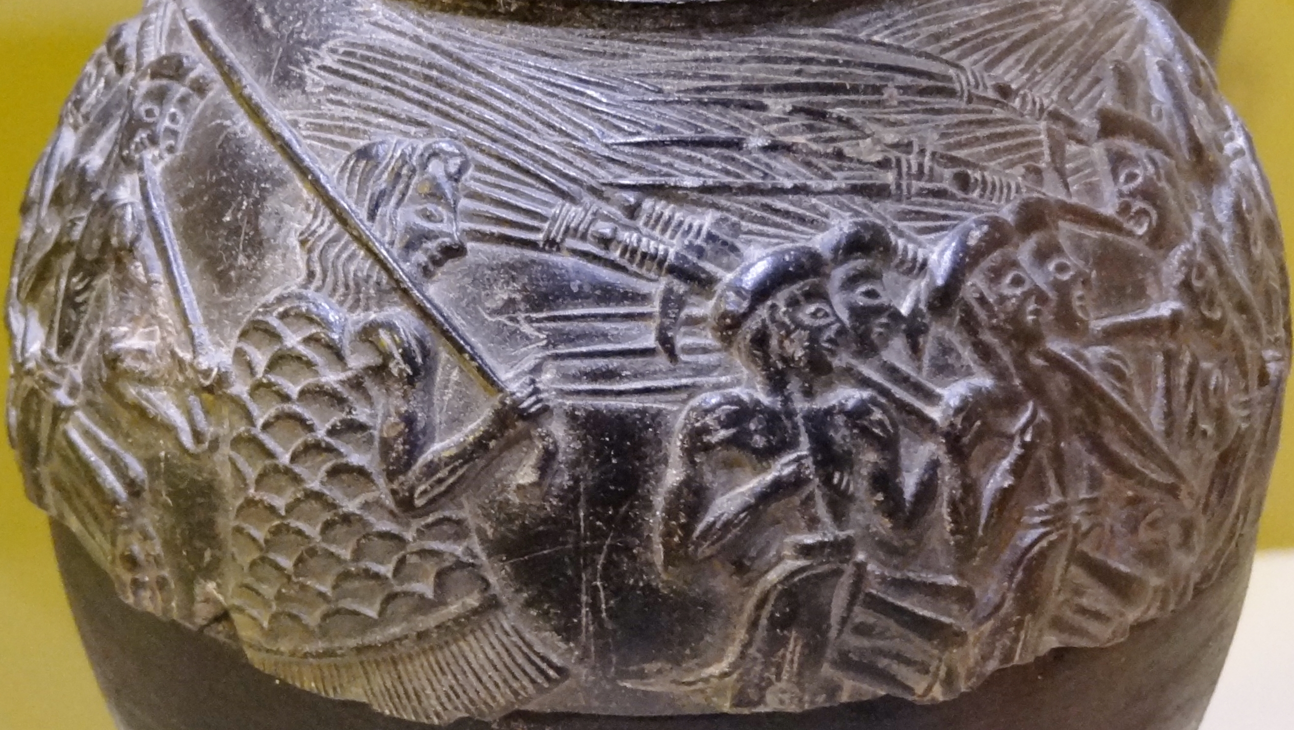 Detail des Reliefs der „Schnittervase“, Reliefrhyton aus Speckstein (Neupalastzeit 1500–1450 v. Chr.) aus Agia Triada, ausgestellt im Archäologischen Museum Iraklio, Kreta, Griechenland